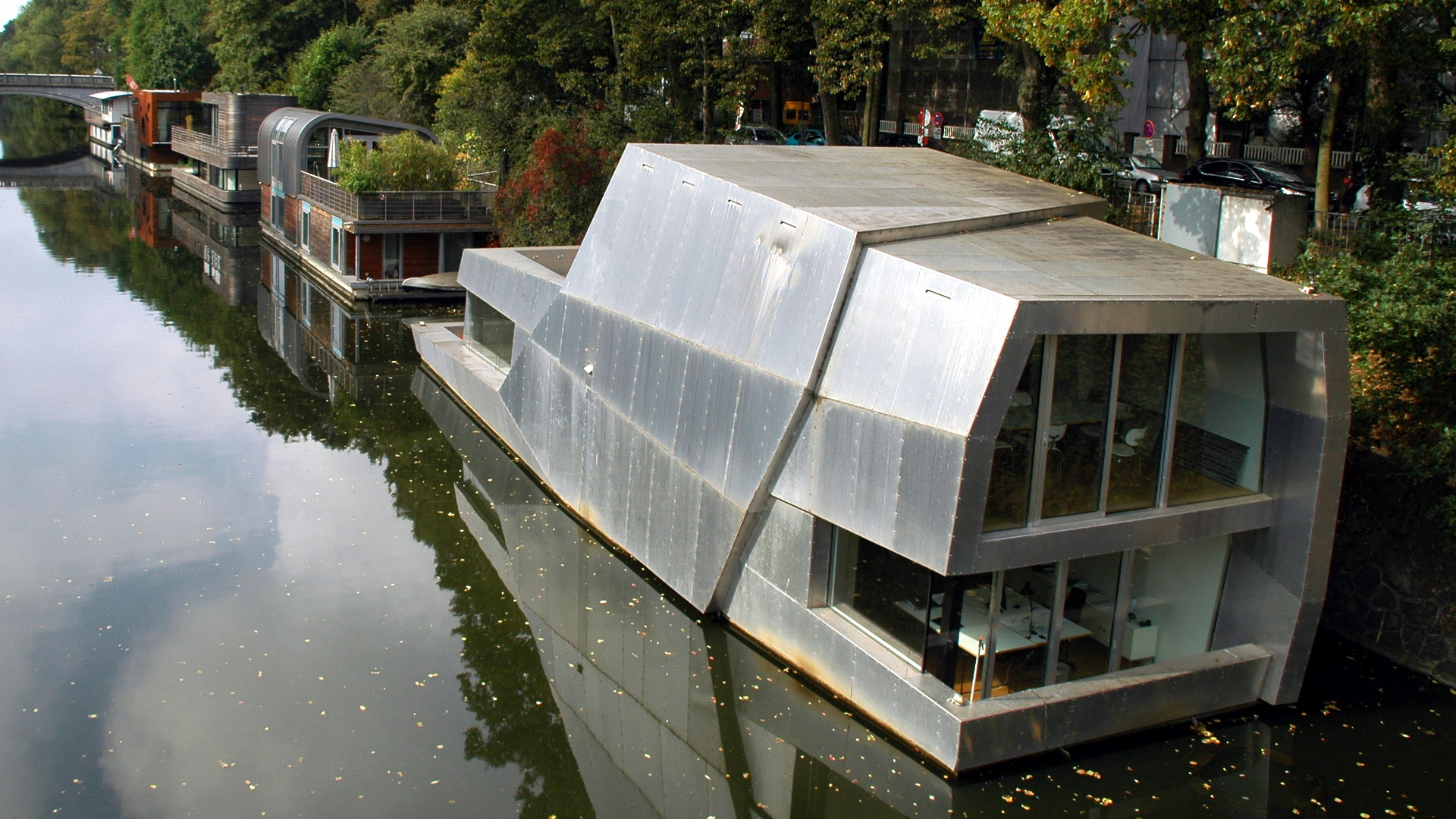 Hamburg Eilbekkanal